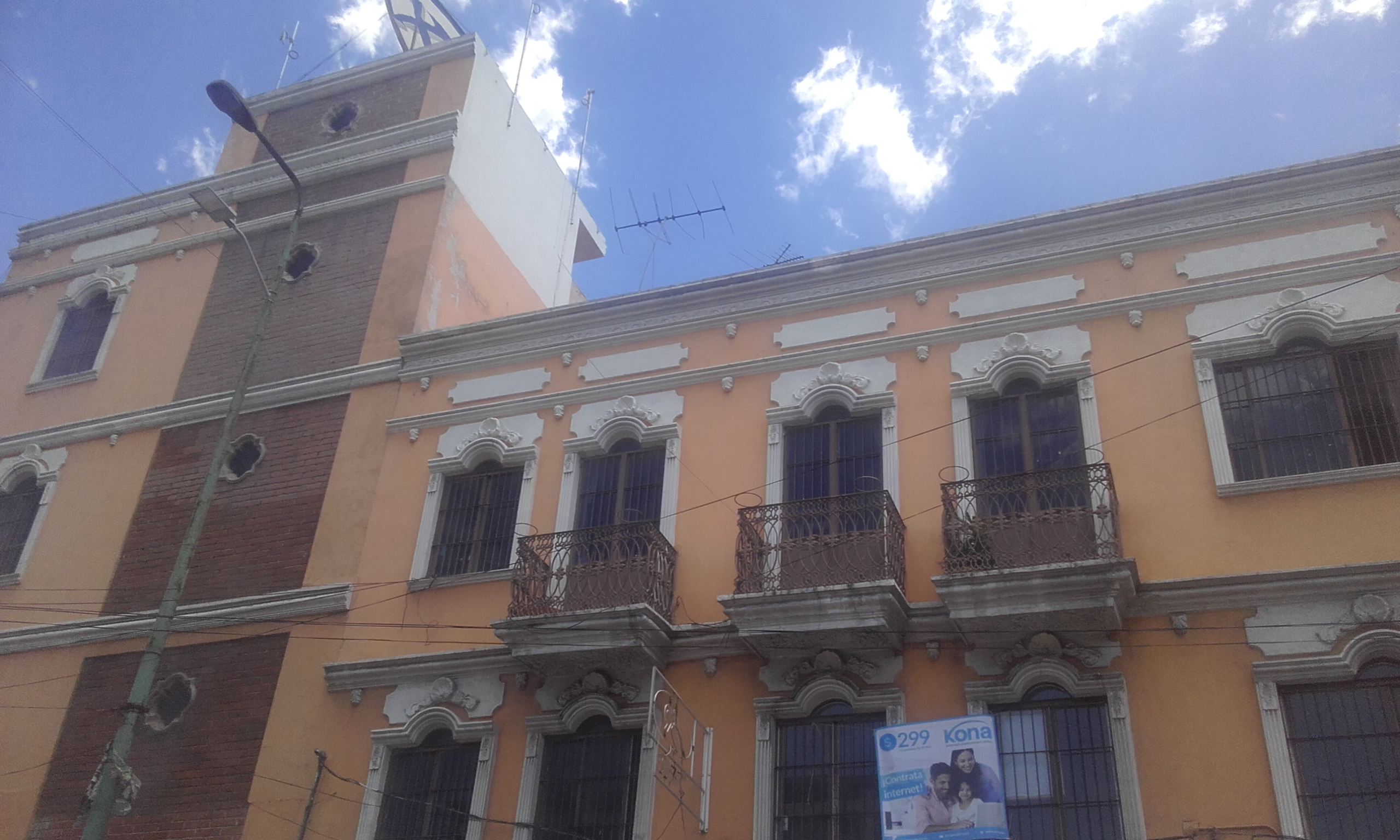 Edificio tipico colonial de Zacatelco